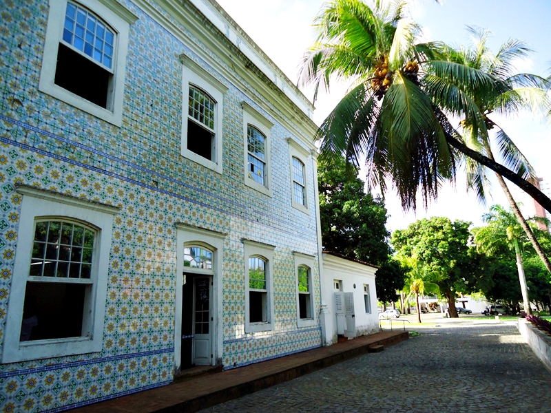 Museu da Abolição, Centro de Referência da Cultura Afro-Brasileira - Recife, Pernambuco, Brasil